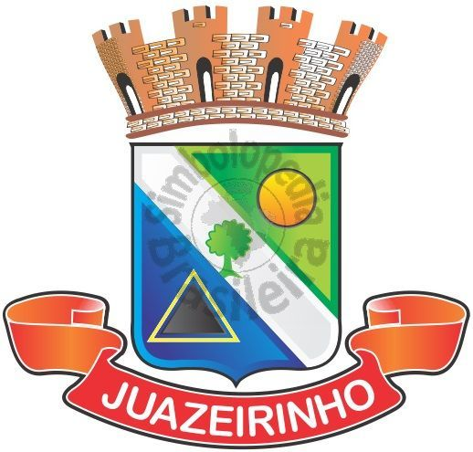 Brasão do município de Juazeirinho na Paraíba